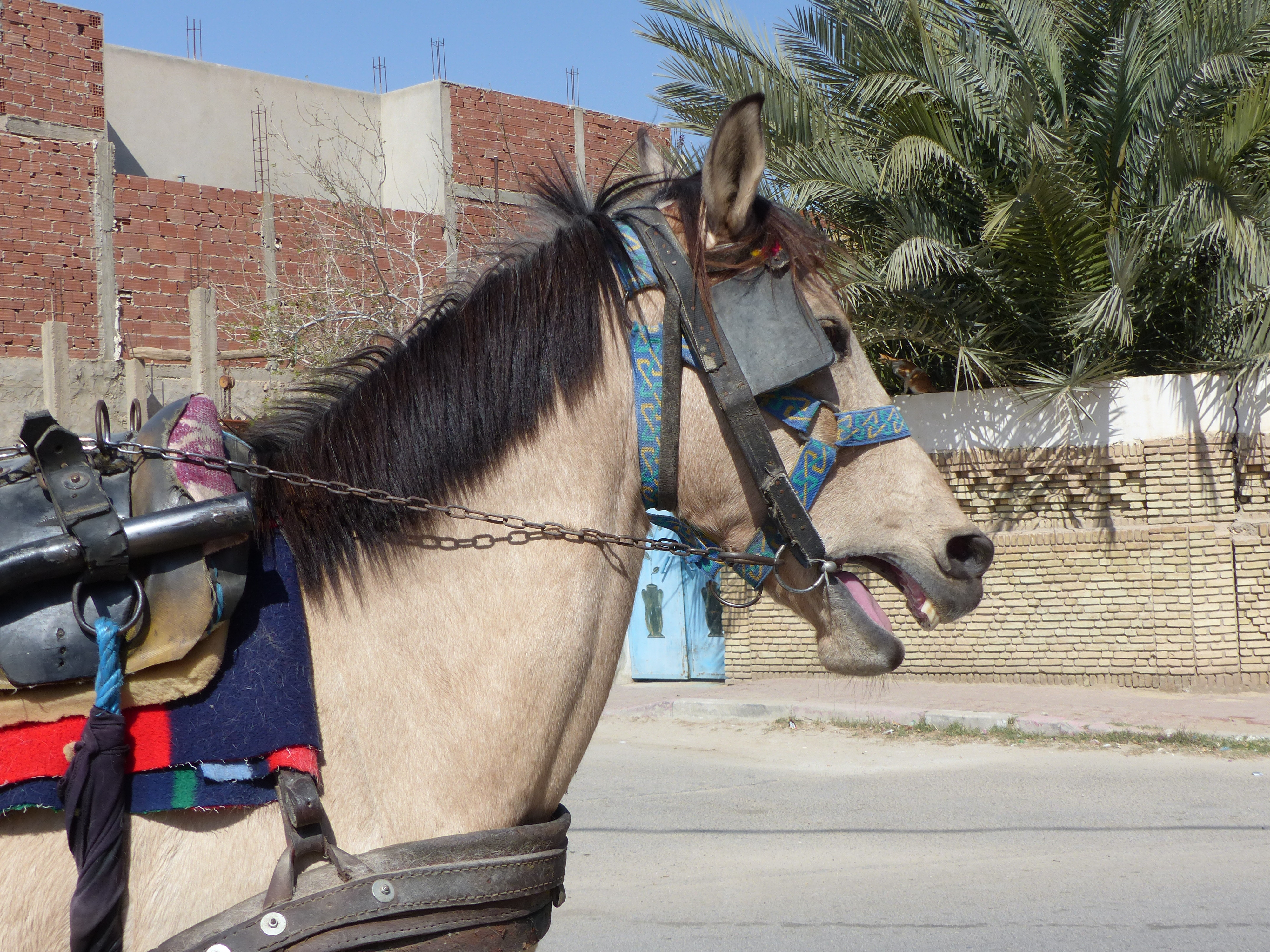 Tête d'un cheval d'attelage de robe isabelle, à Tozeur, Tunisie. This is an image with the theme "Africa on the Move or Transport" from: Tunisia